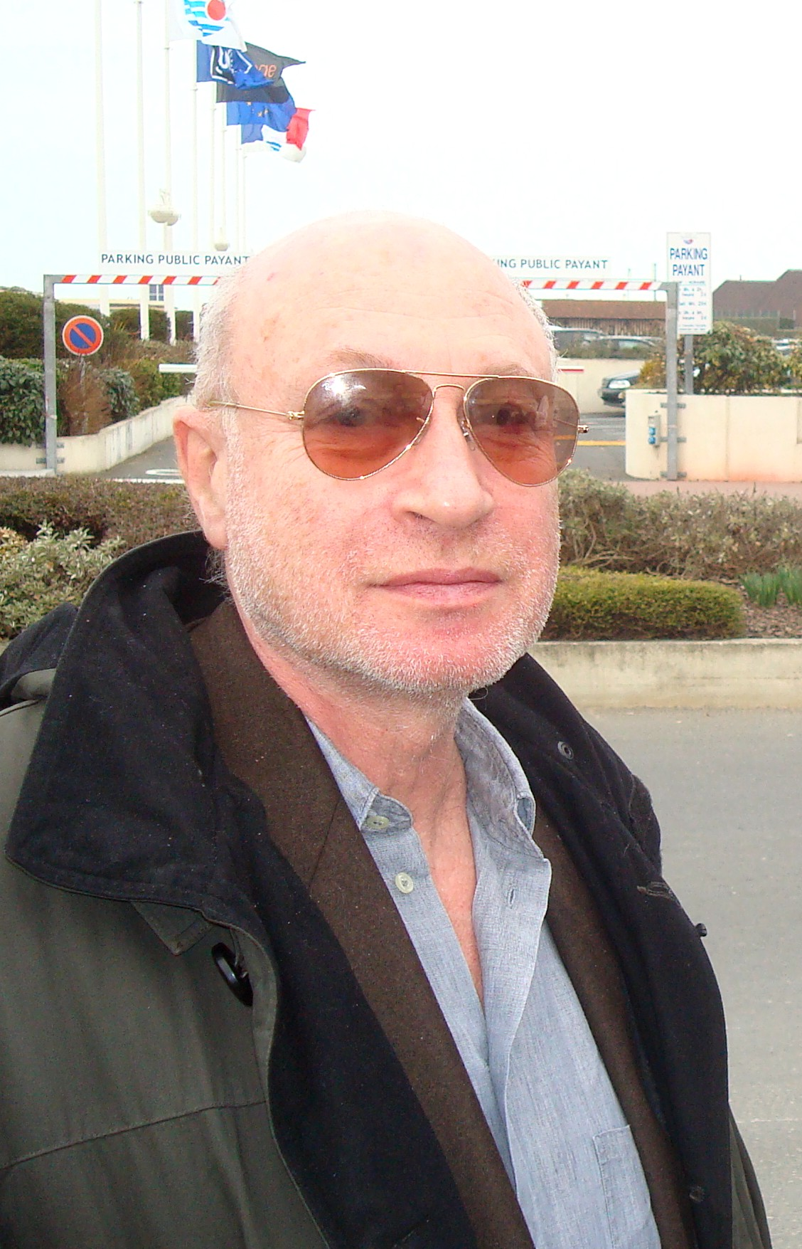 Le réalisateur français Pascal Bonitzer au festival du film asiatique de Deauville, en 2010.